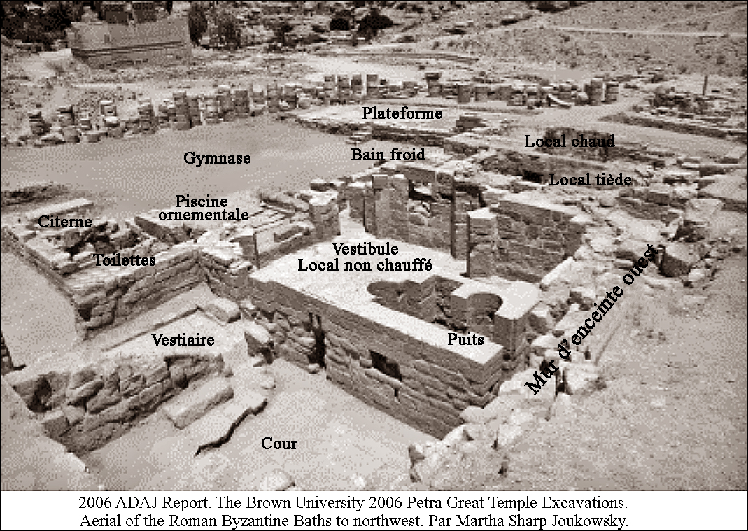 Vue aérienne des thermes du Grand Temple avec les textes en français.